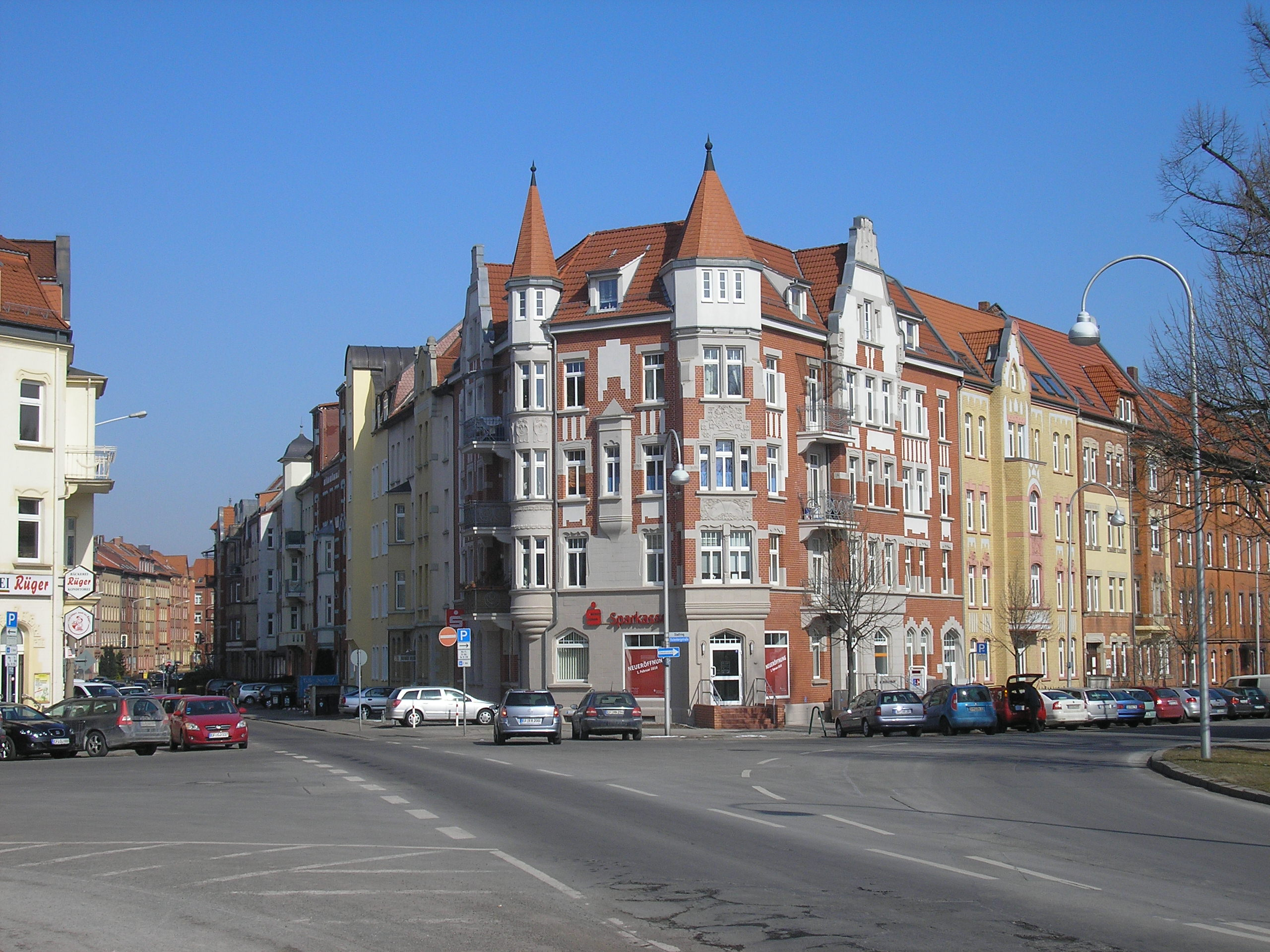 Blick in die Albrechtstraße vom Gutenbergplatz aus in Erfurt.